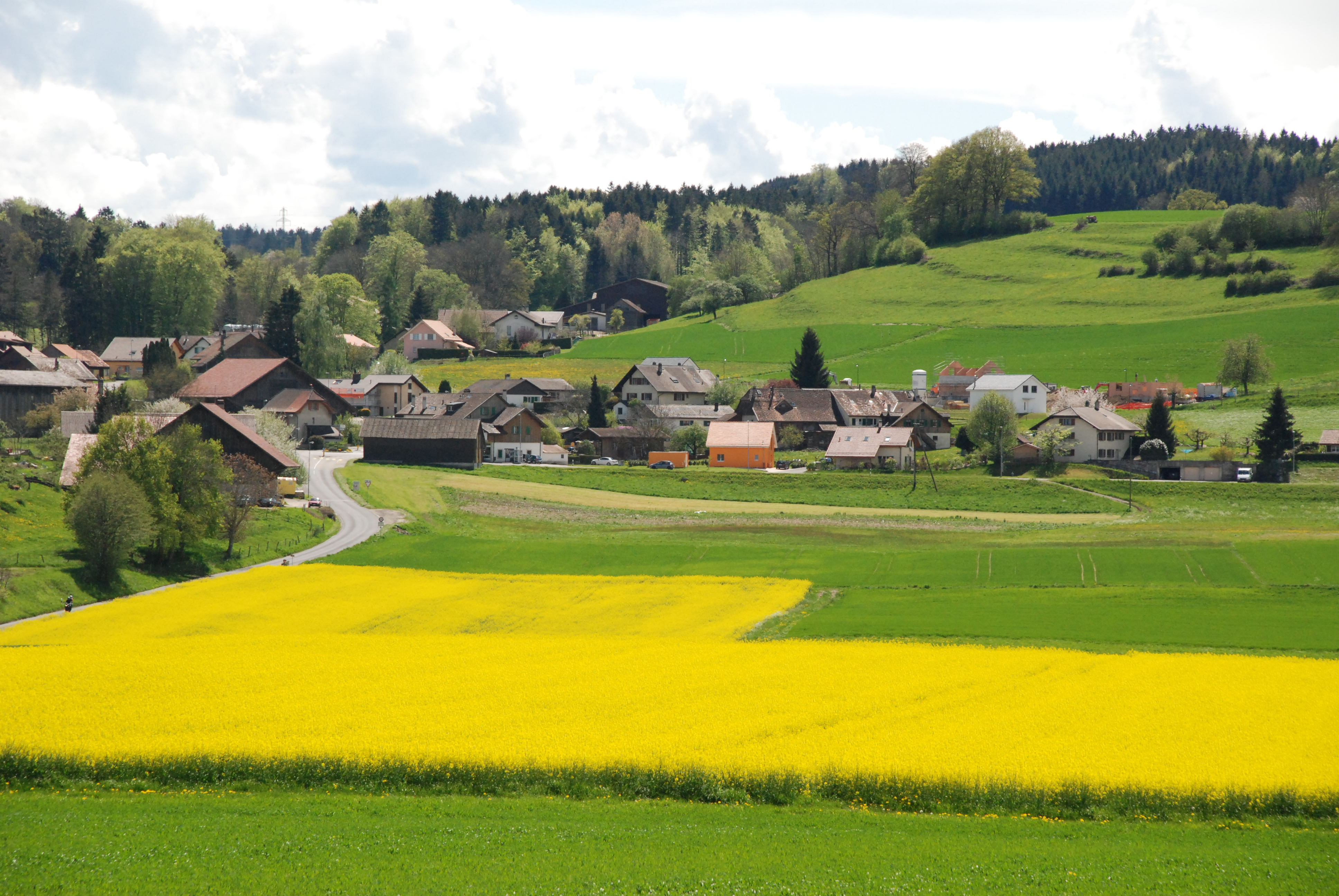 Vue du village de Villars-Mendraz